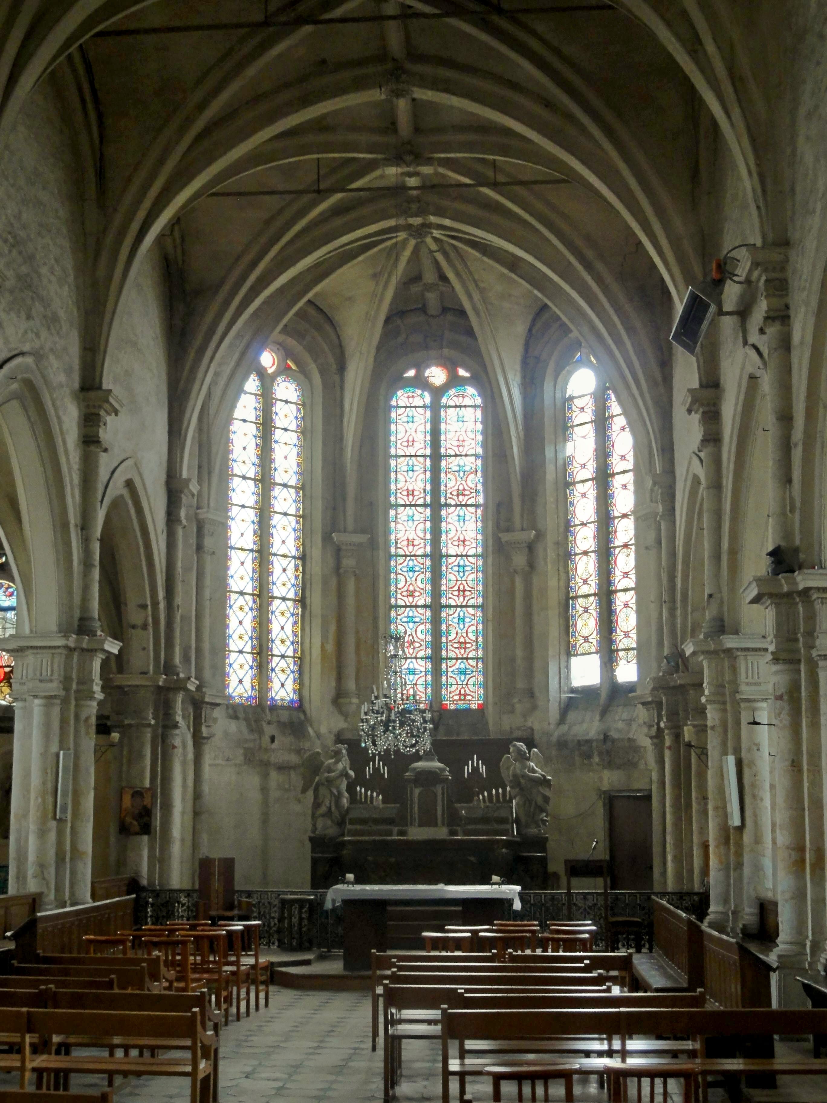 Chœur.